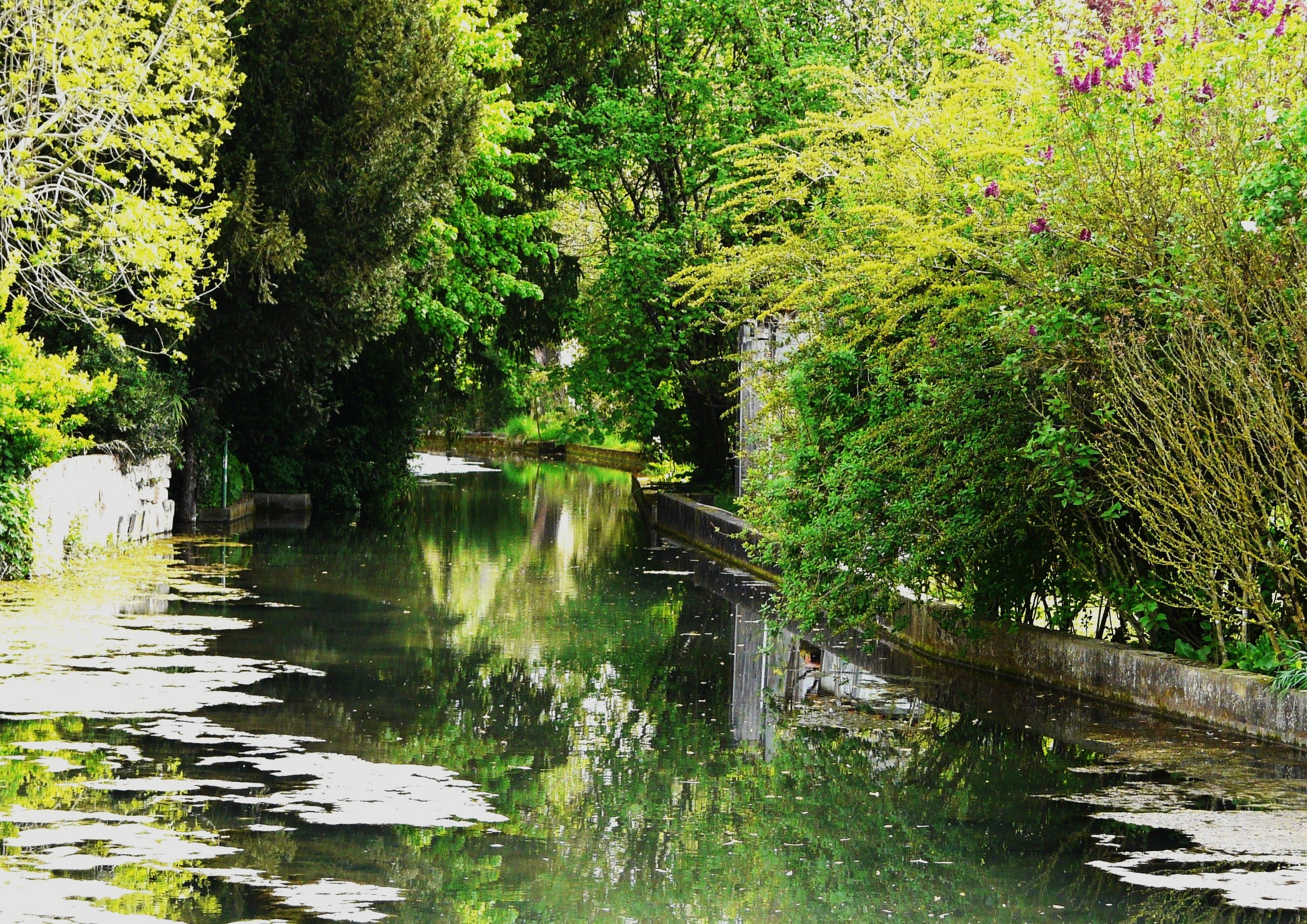 La retenue de la Beauronne dans le bourg d'Agonac, Dordogne, France